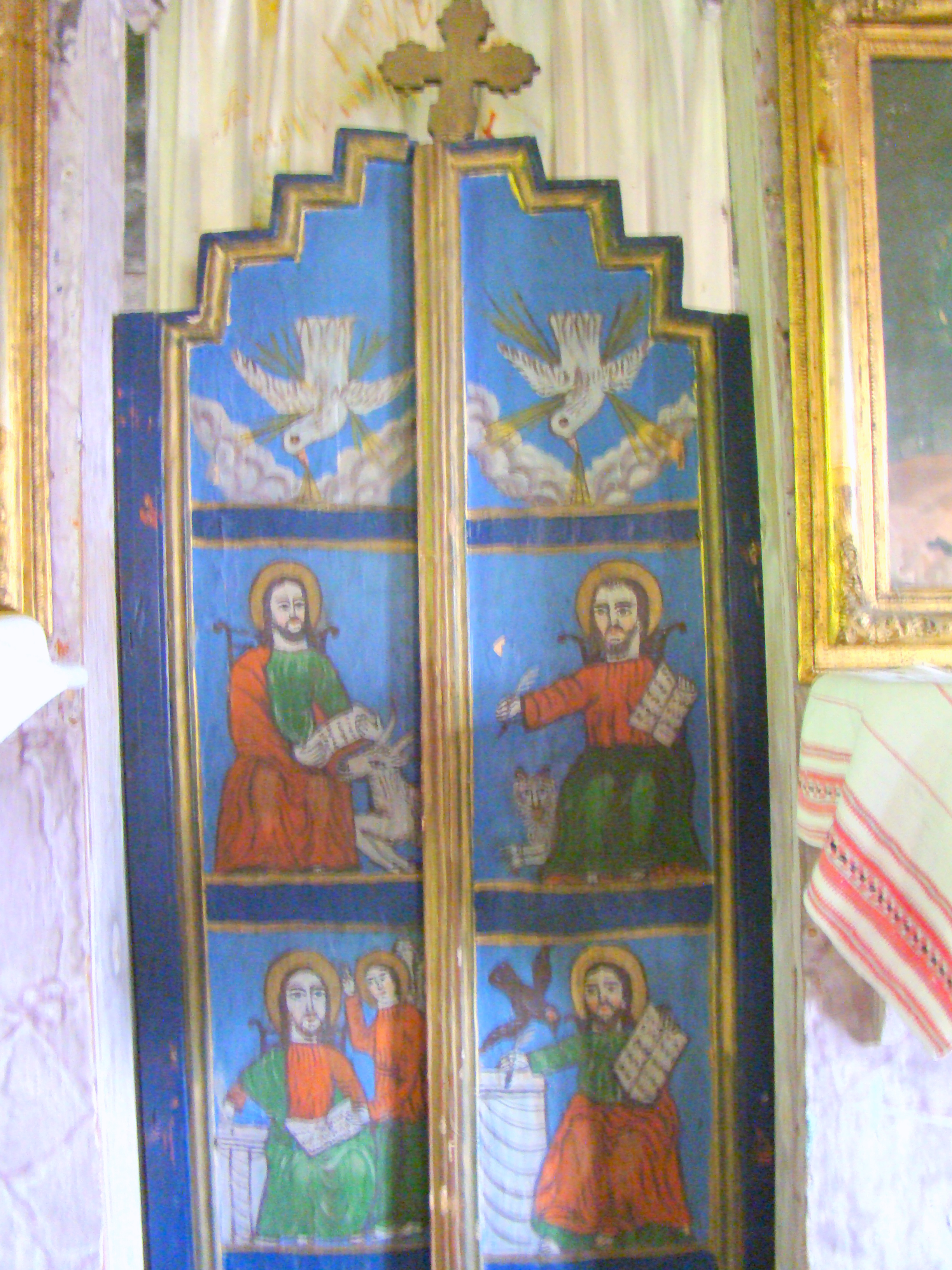 Biserica de lemn „Sf.Nicolae” din Boiereni, județul Maramureș